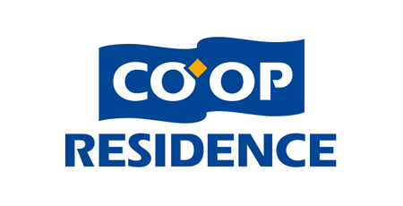 CO-OP Residence logo